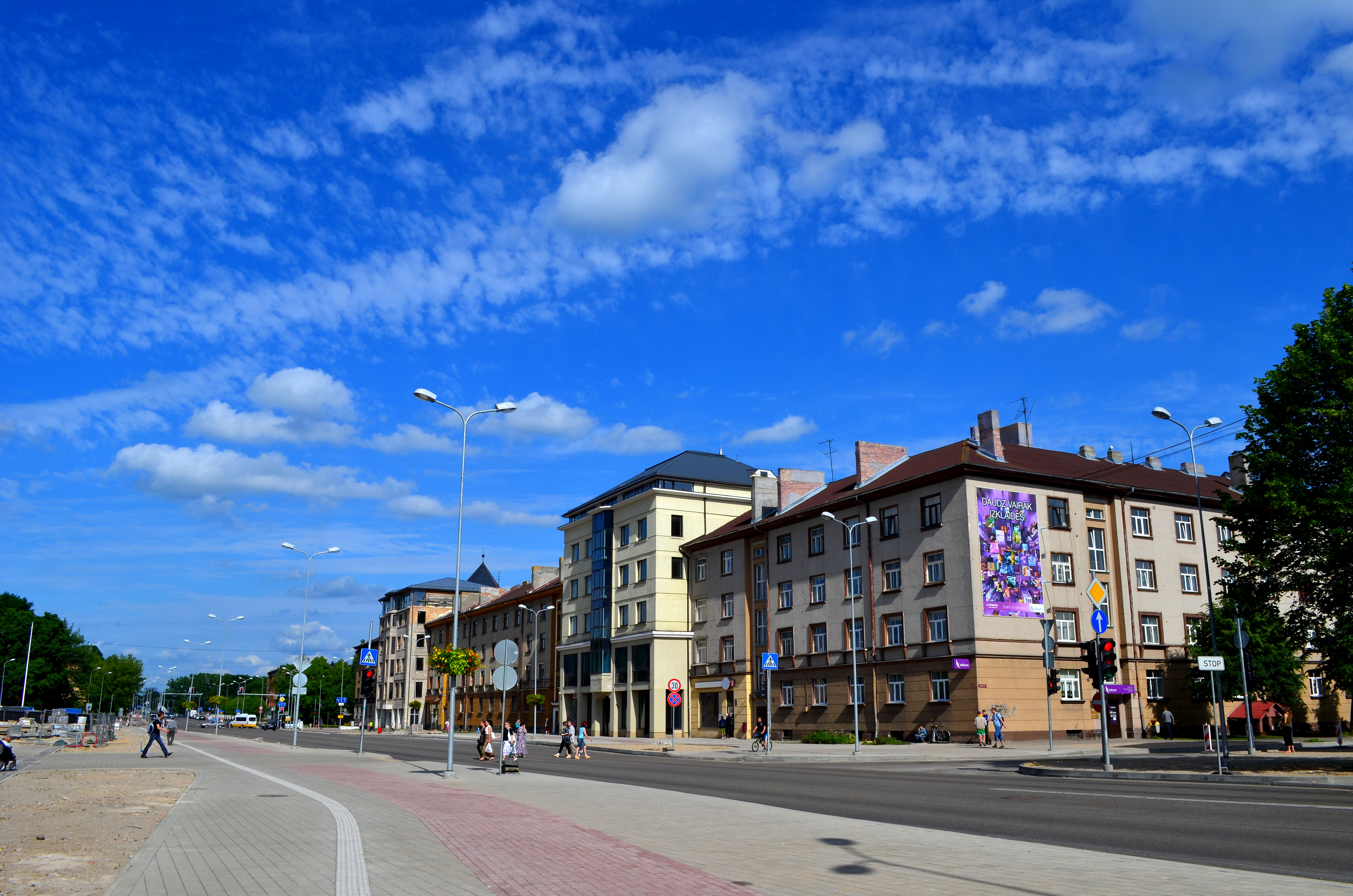 Jelgavas Lielā iela